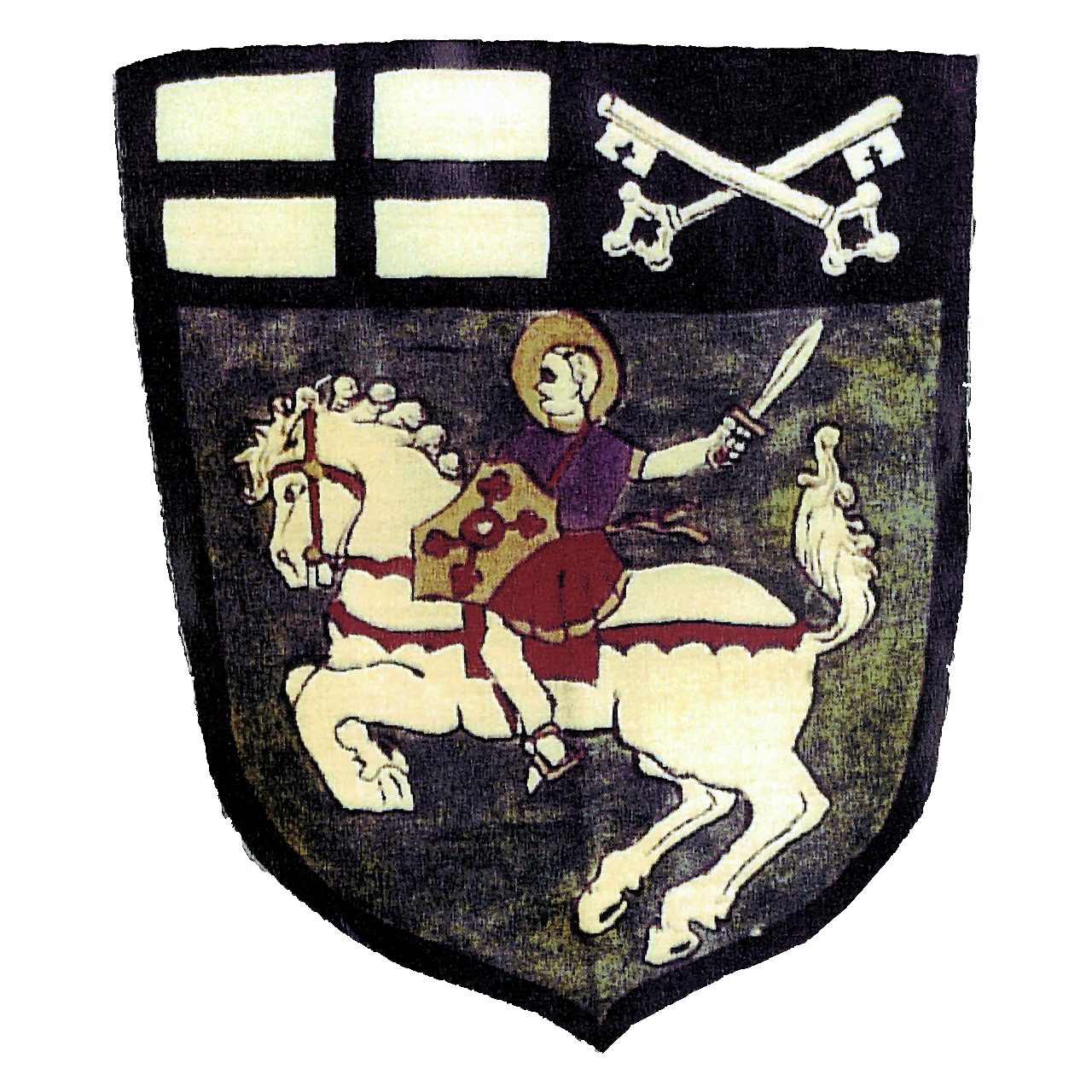 Historisches Wappen der Gemeinde Büderich (heute Meerbusch), geführt von 1930 bis 1970